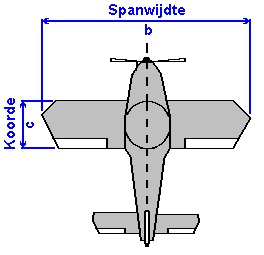 Spanwijdte